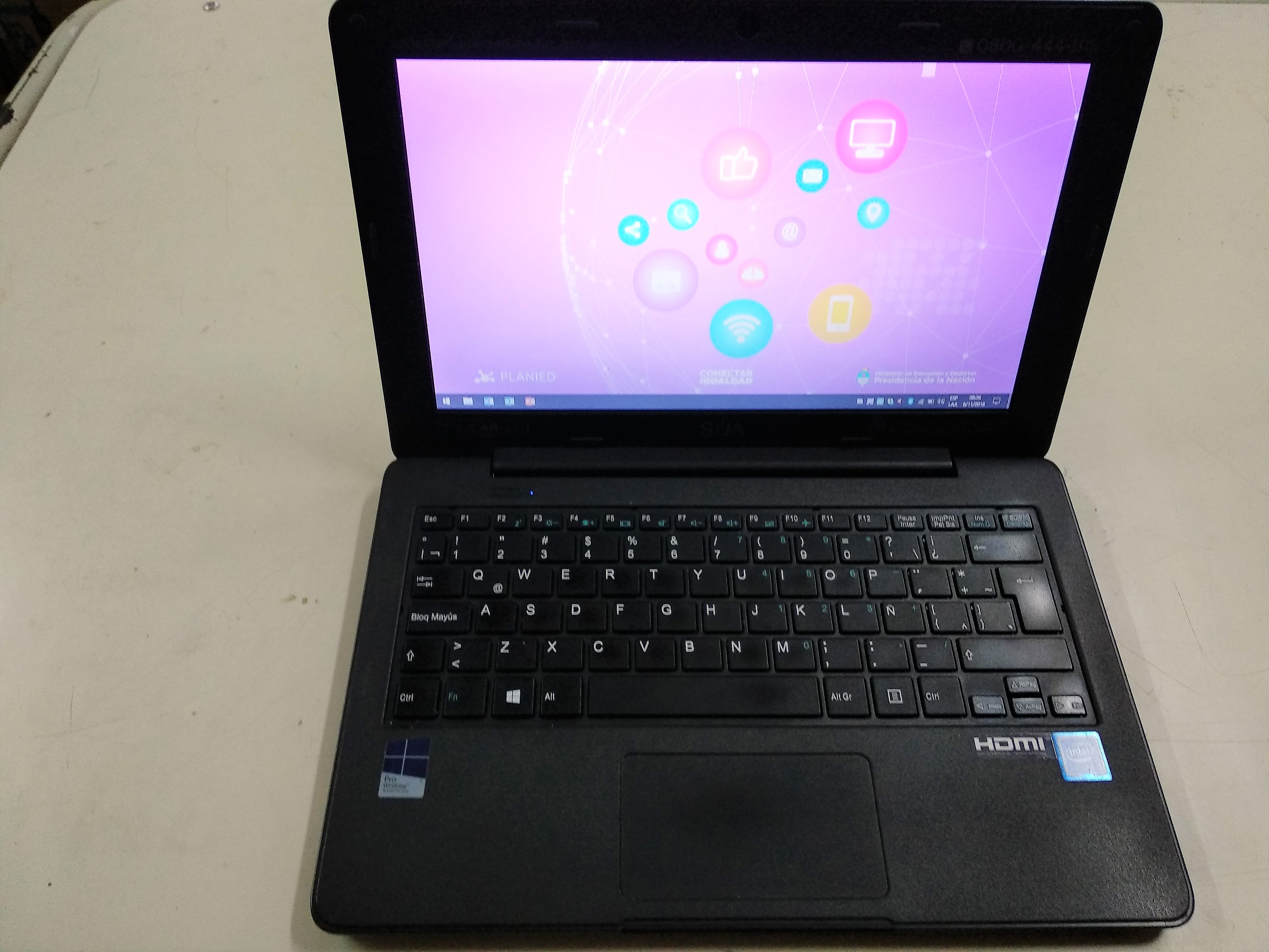 Ultimo modelo (7ma. generación) de computadora de Conectar Igualdad entregado a los alumnos.